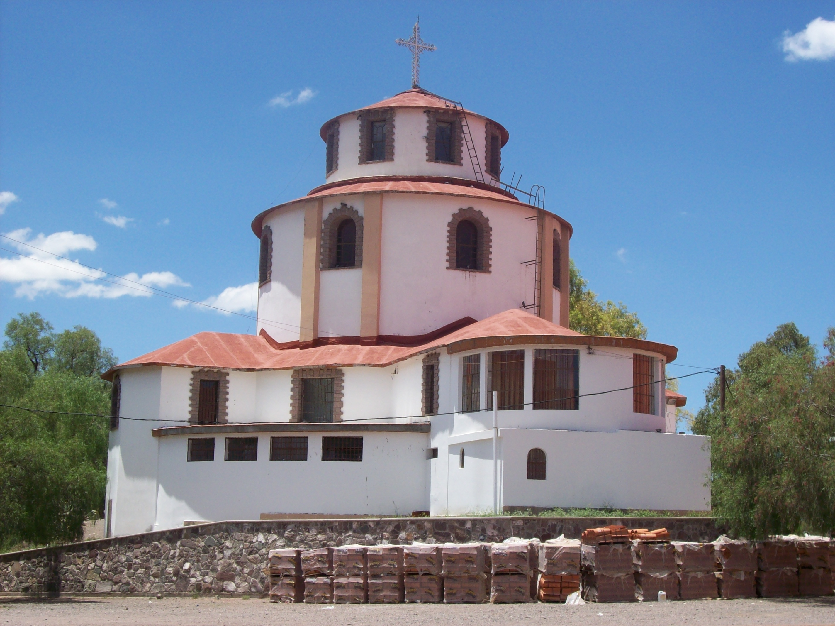 Capilla junto al Santuario Nuestra Señora de Lourdes en El Challao, Departamento Las Heras, Provincia de Mendoza, Argentina.